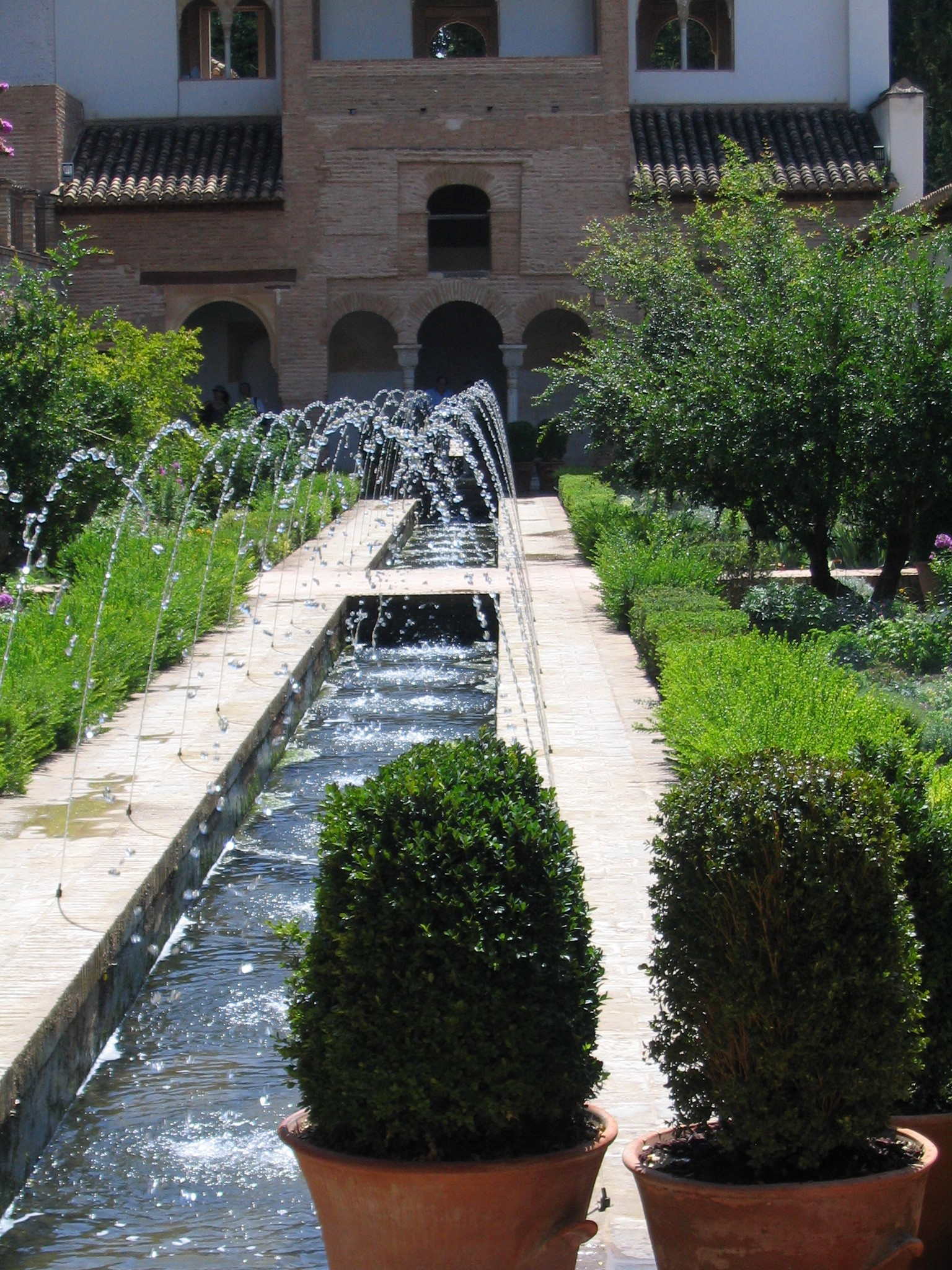 Bassins du Palais du Generalife, Alhambra de Grenade, Espagne.